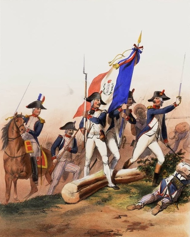 Infanterie de ligne française, 1793. De gauche à droite : officier supérieur, soldats des compagnies du centre, sergent de grenadiers et officier subalterne.